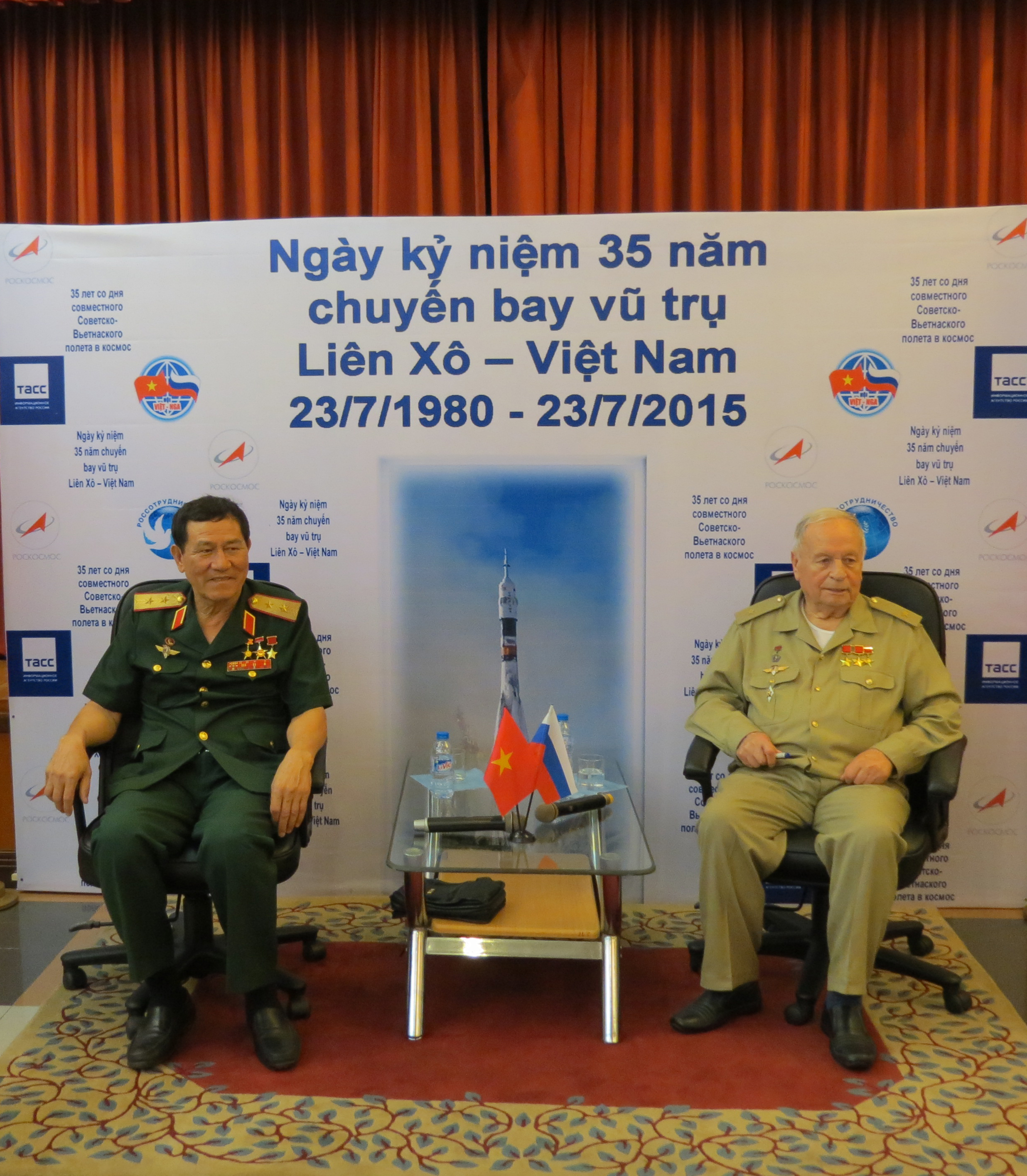 Phạm Tuân tại cũng văn hóa Nga, tối 22-7-2015